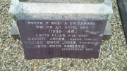 Cofeb ryfel Penysarn